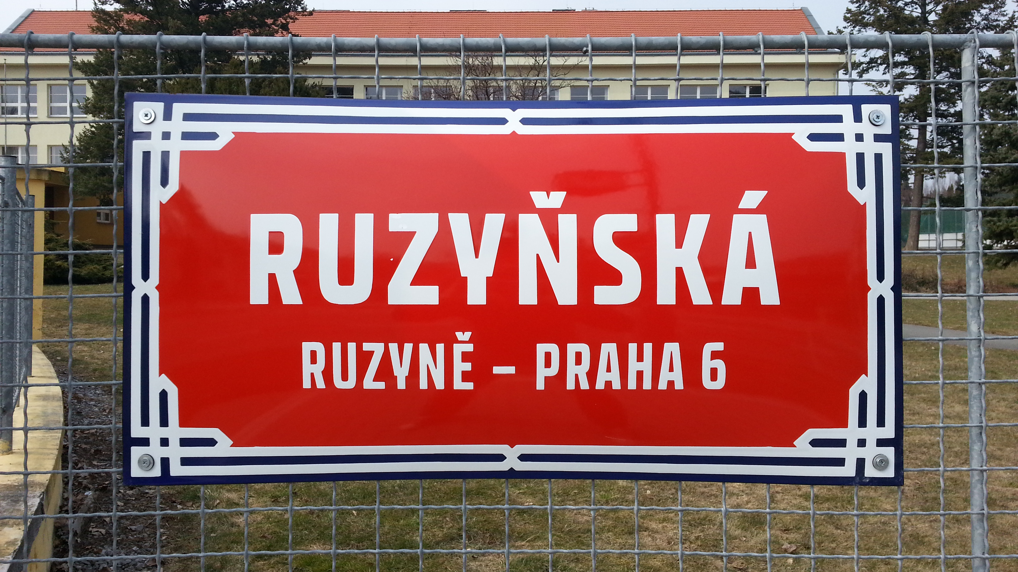 Aktuální podoba pražských uličních smaltovaných tabulí (duben 2013).